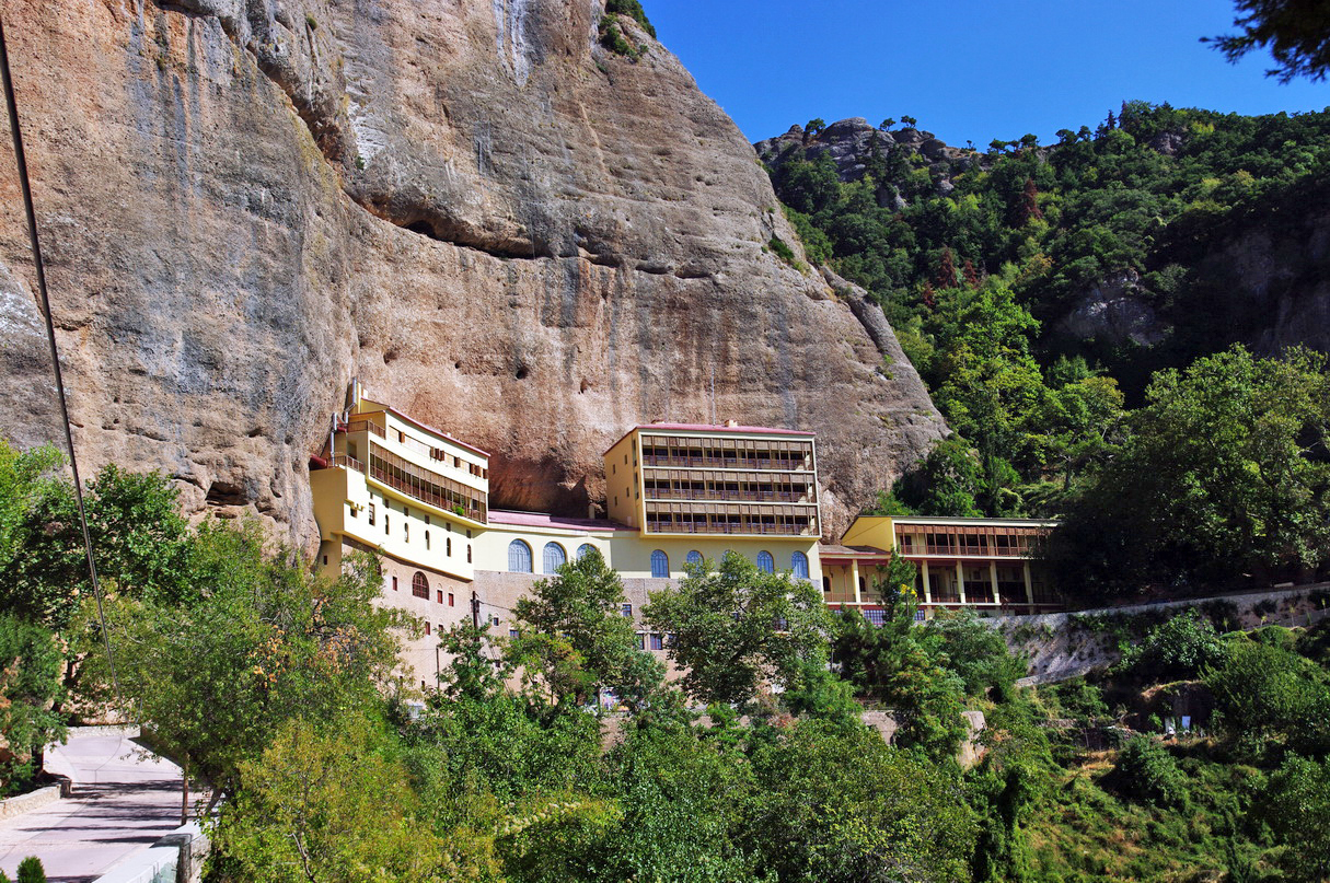 Höhle Kloster Mega-Spilaio